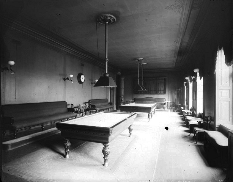 Interiör från Stora Sällskapets biljardsal, Arsenalsgatan 7